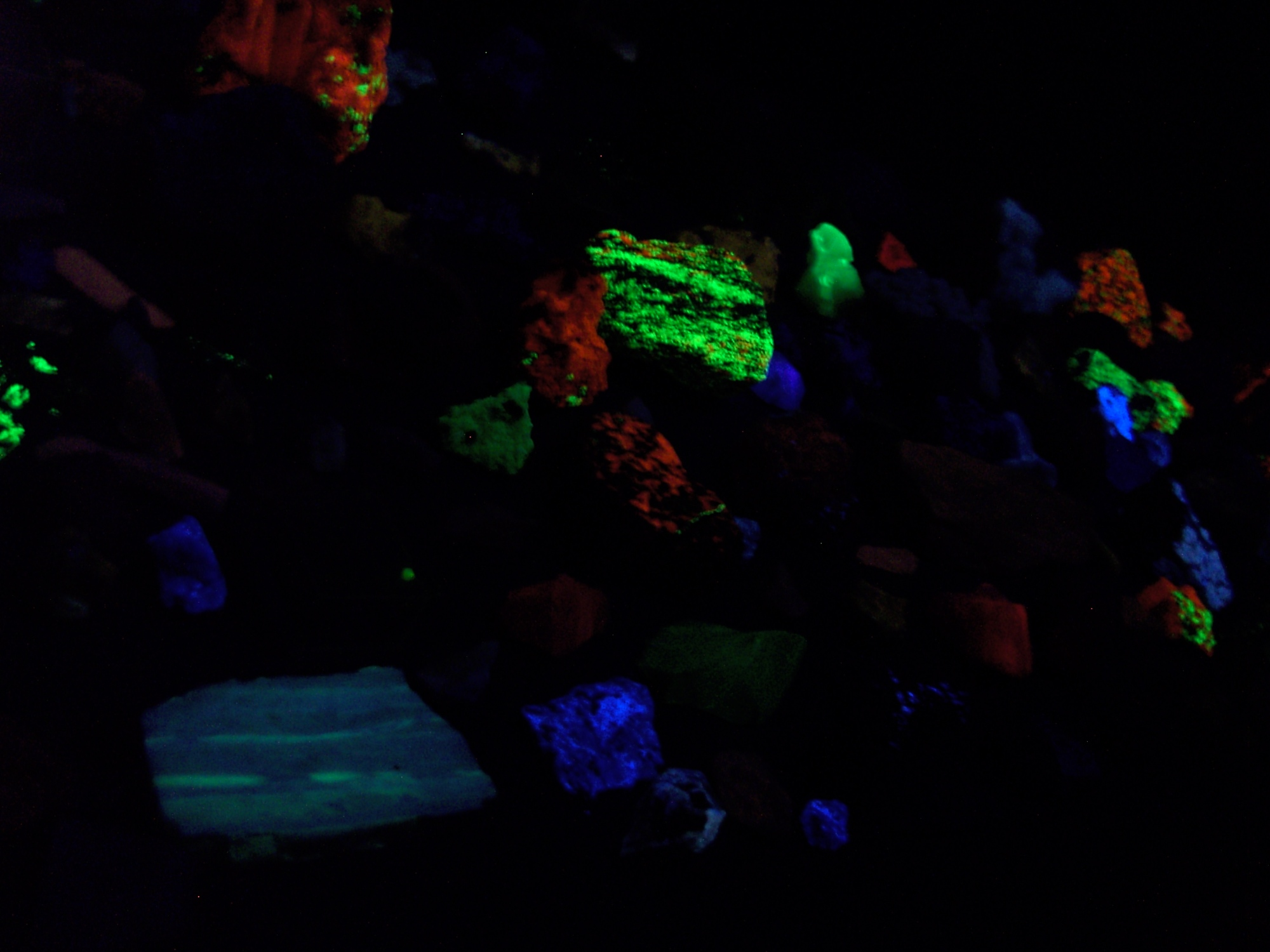 Die Gesteinssammlung der Ausstellung „Steinwelten“ im Granitzentrum Hauzenberg umfasst eine Vielzahl verschiedener Steine aus aller Welt. Durch Lichtanregung (mit verschiedenen Wellenlängen) wird Lumineszenz der Mineralen hervorgerufen.